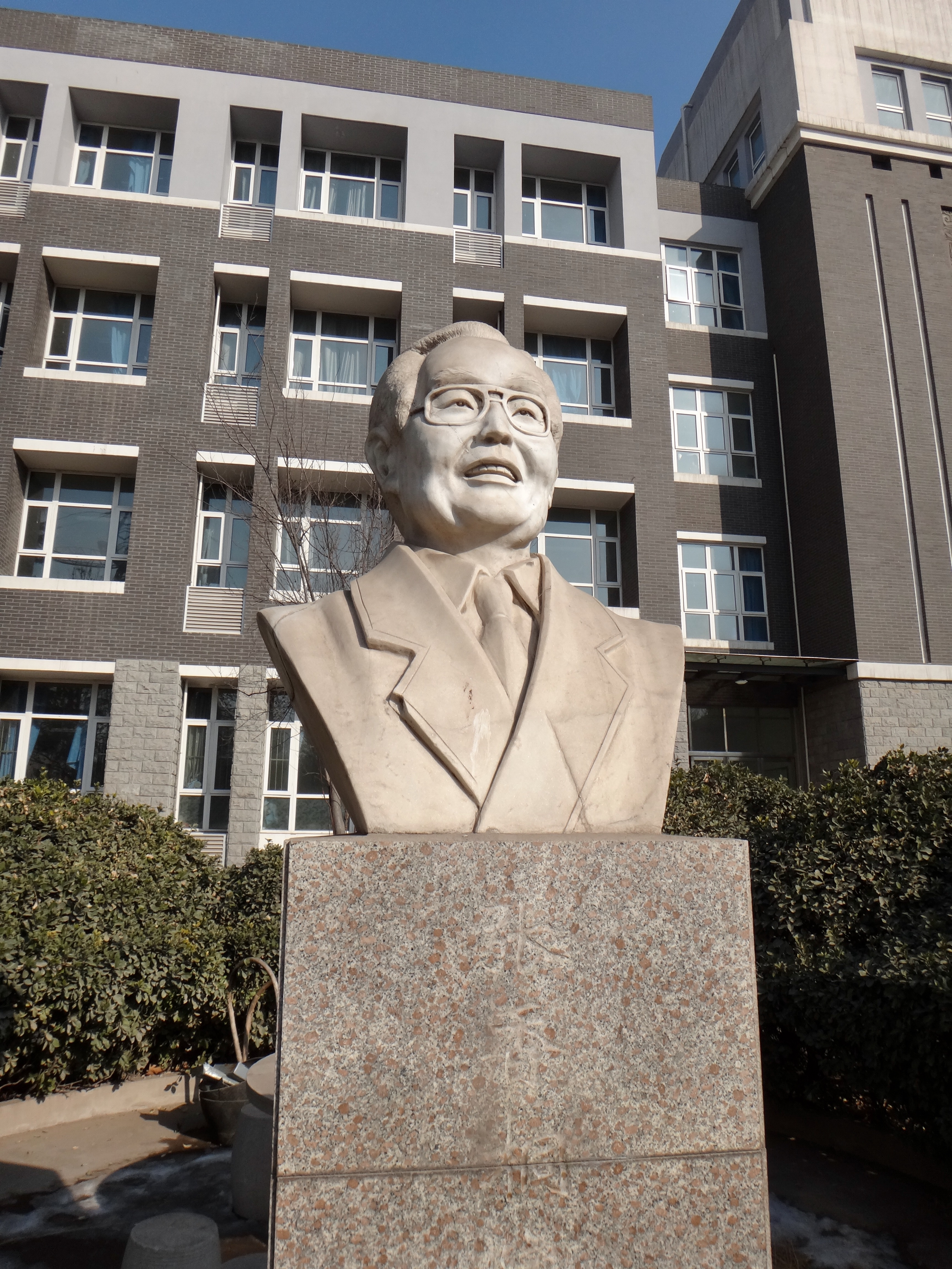 河北正定中学内校友张香桐塑像